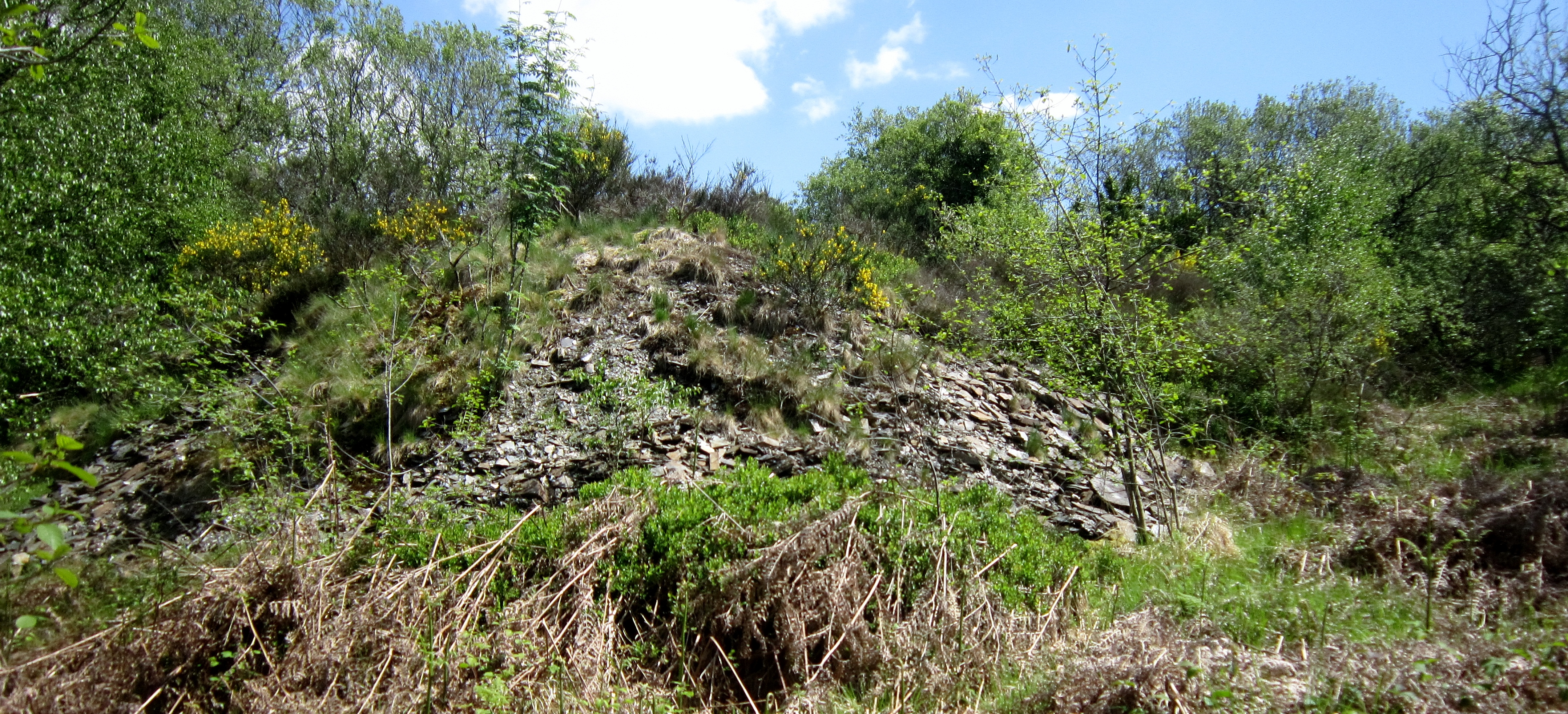 Commana : terril, en partie recouvert par la végétation, d'une ancienne carrière d'ardoises (versant nord des Monts d'Arrée).